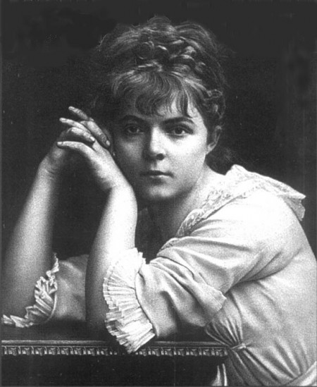 Мария Башкирцева